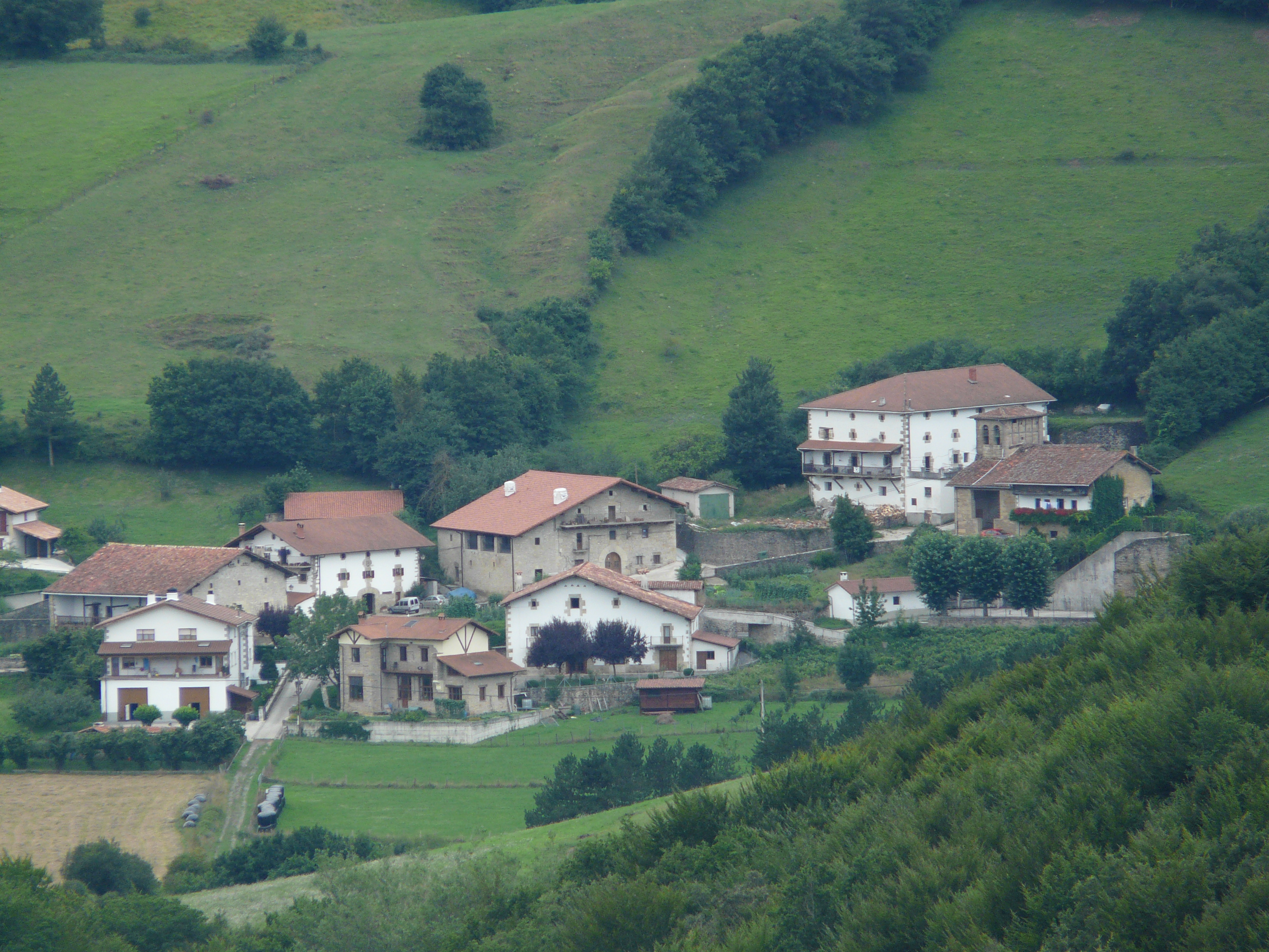 Eraso vist des de la carretera prop de Zarrantz (Imotz)